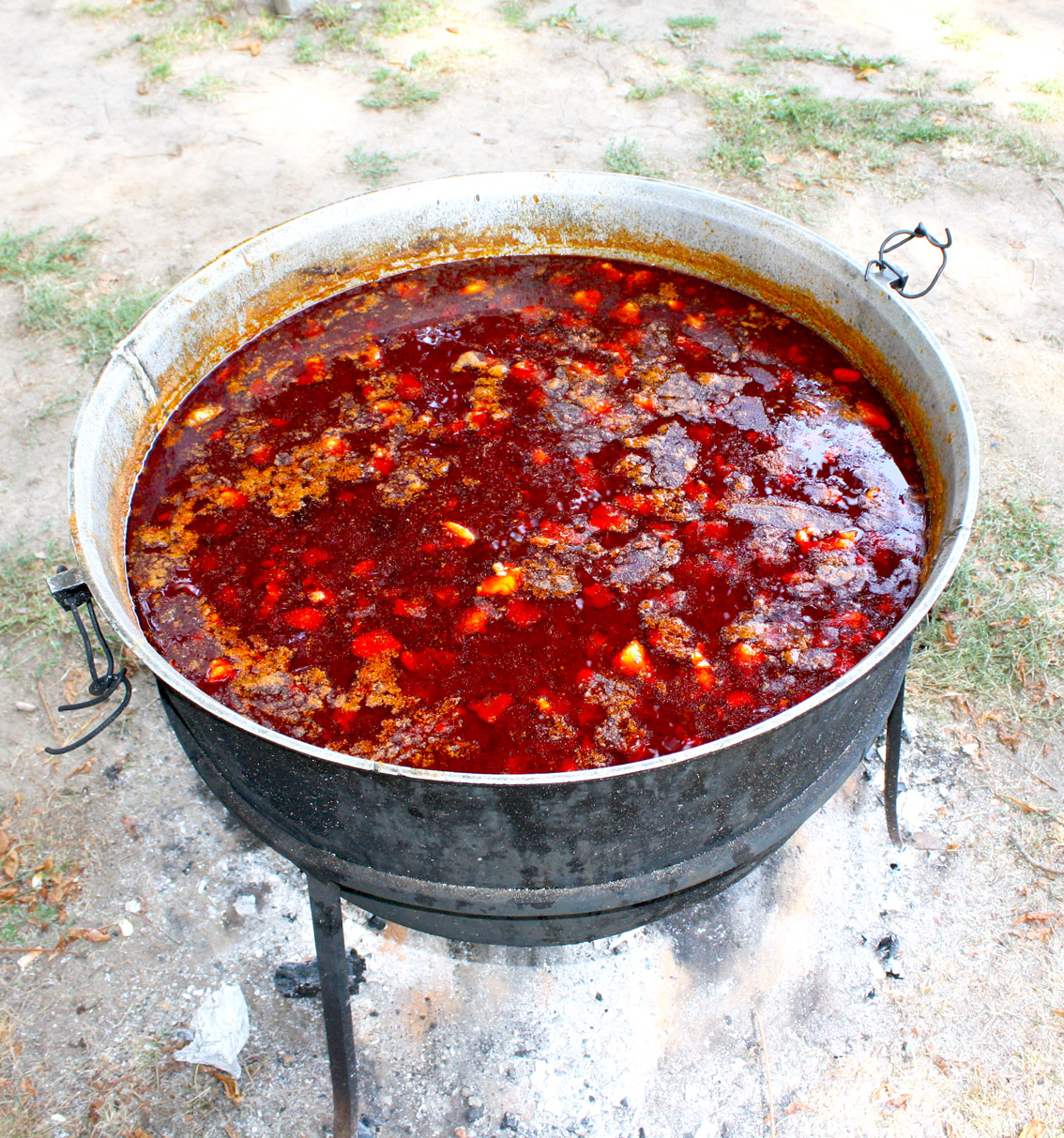 Боб-гуляш (Babgulyás) - страва угорської кухні.